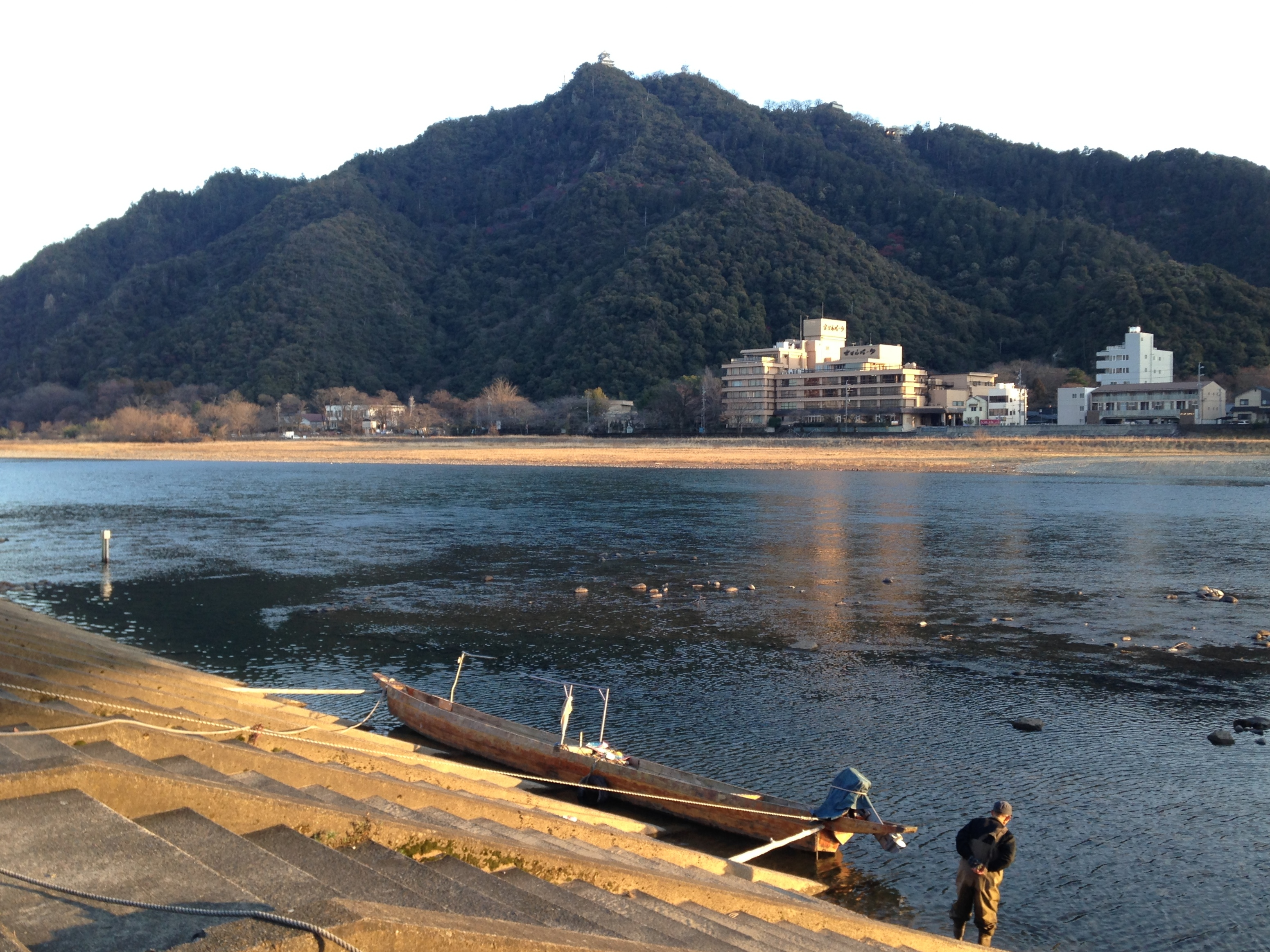 長良川の鵜舟と金華山(岐阜城は山頂にある)